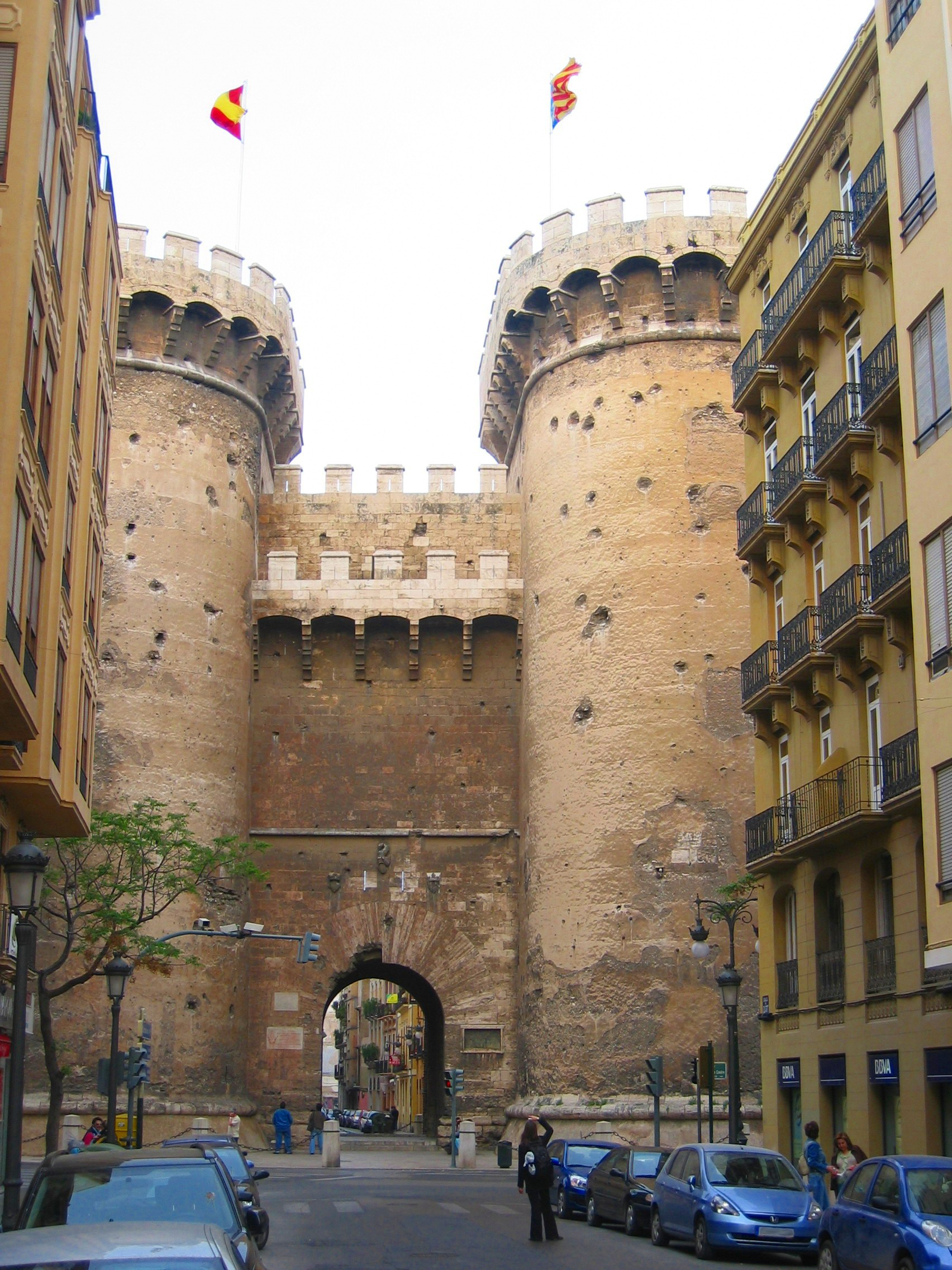 València Portes de Quart